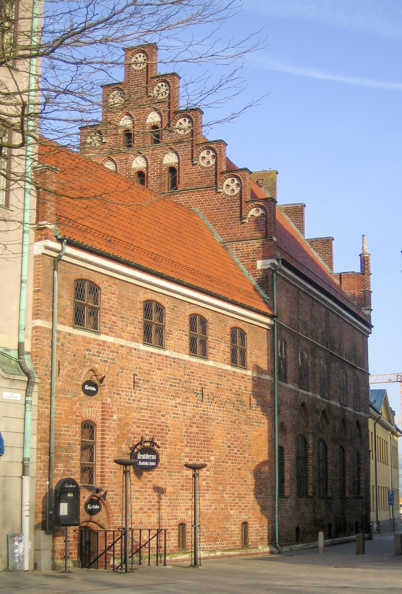 Jörgen Kocks house in Malmö, Sweden